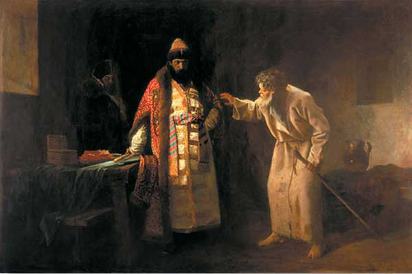 Николай Салос — псковский юродивый. В 1570 во время похода Ивана IV на Псков встретил царя у ворот города, обличая его в кровожадности и устрашая возмездием, после чего царь отошёл от Пскова.